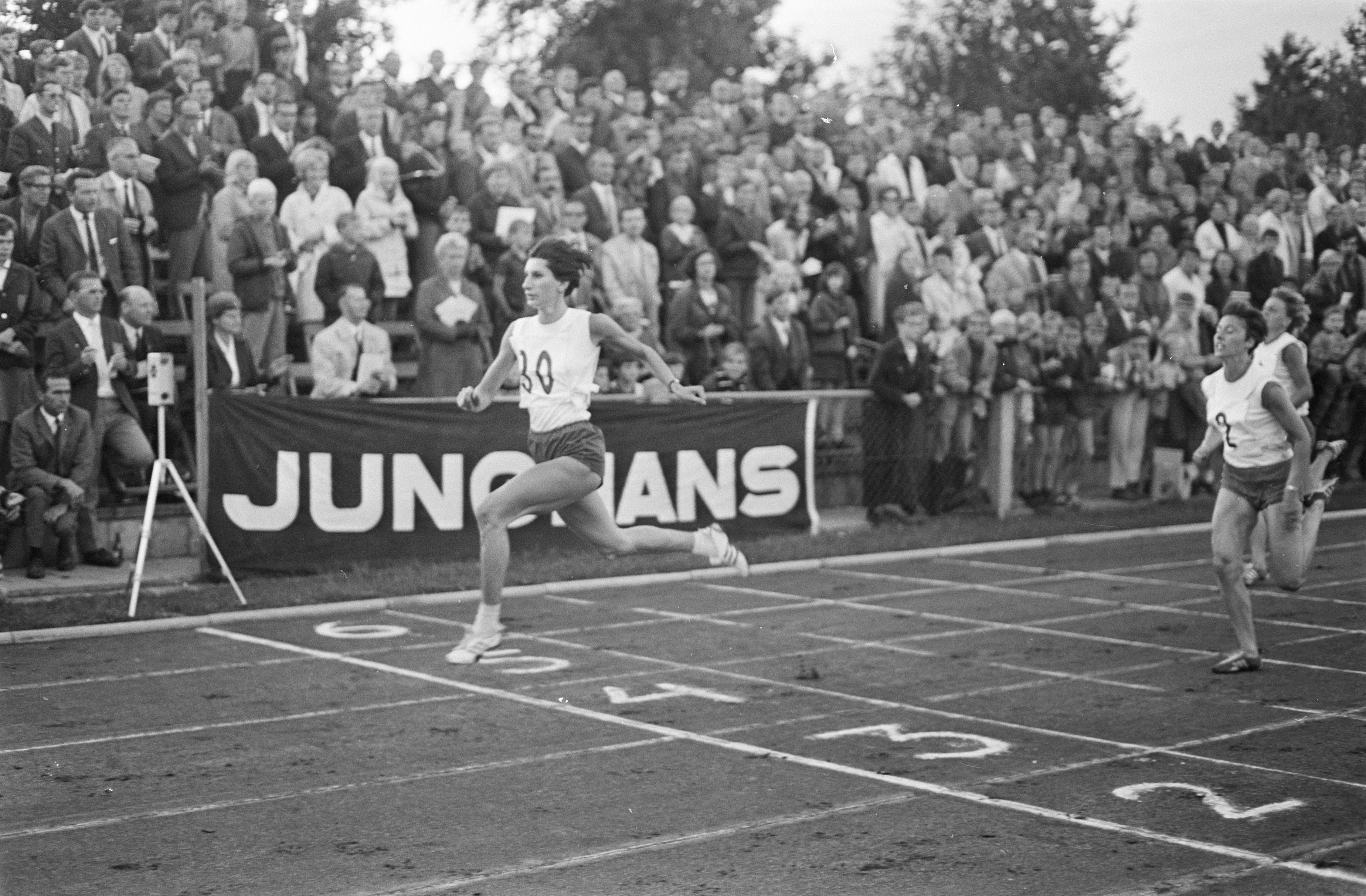 Collectie / Archief : Fotocollectie Anefo Reportage / Serie : Atletiek Nederland-Polen dames te Uden Beschrijving : De Poolse Irena Kirszenstejn gaat door finish, tweede: Truus Hennipman-Cruiming Datum : 19 augustus 1968 Locatie : Noord-Brabant, Uden Trefwoorden : atletiek, hardlopen, kampioenschappen Persoonsnaam : Kirszenstejn, Irena Fotograaf : Fotograaf Onbekend / Anefo Auteursrechthebbende : Nationaal Archief Materiaalsoort : Negatief (zwart/wit) Nummer archiefinventaris : bekijk toegang 2.24.01.05 Bestanddeelnummer : 921-6071